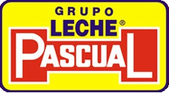 Logo de Leche Pascual anterior a 2004.